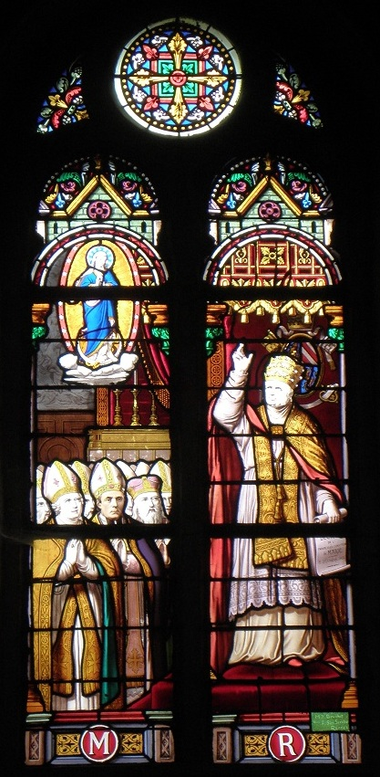 Proclamation du dogme de l'Immaculée Conception par Pie IX le 8 décembre 1854. Vitrail de l'église de Bécherel (35), baie 02, figurant Godefroy Brossay-Saint-Marc, évêque de Rennes.